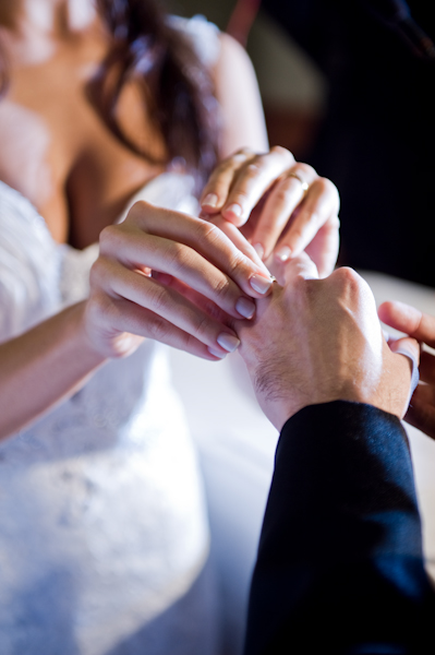 Wedding Photography